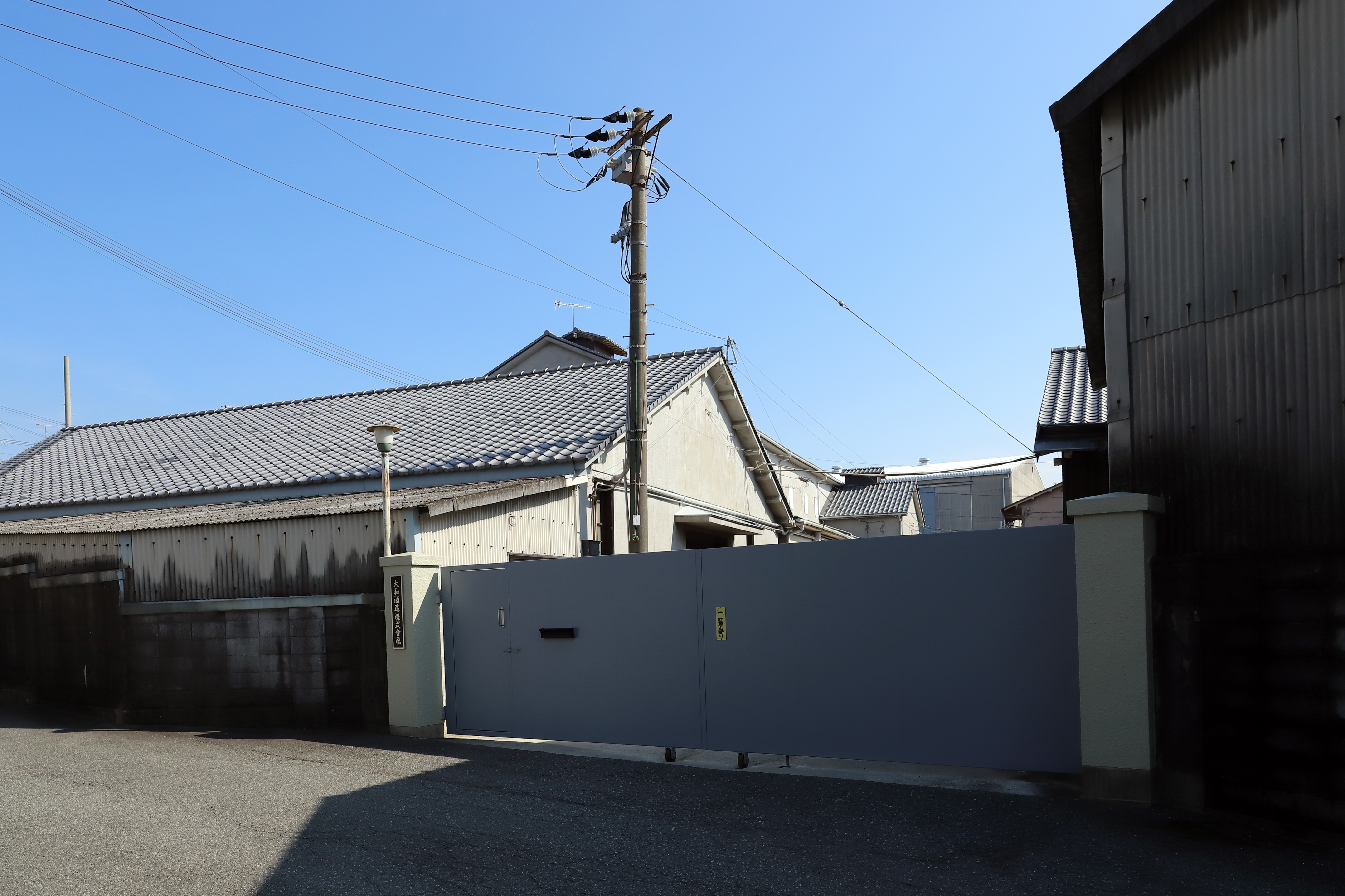 江井ヶ島にある大和酒造